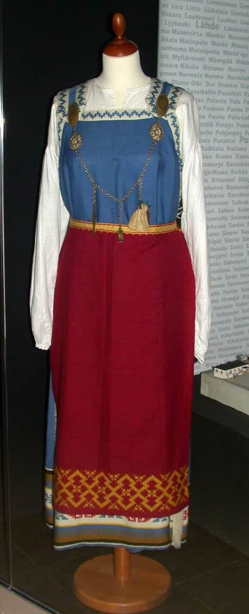 Aino-puku 1900-luvun alusta